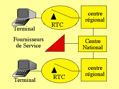 Description